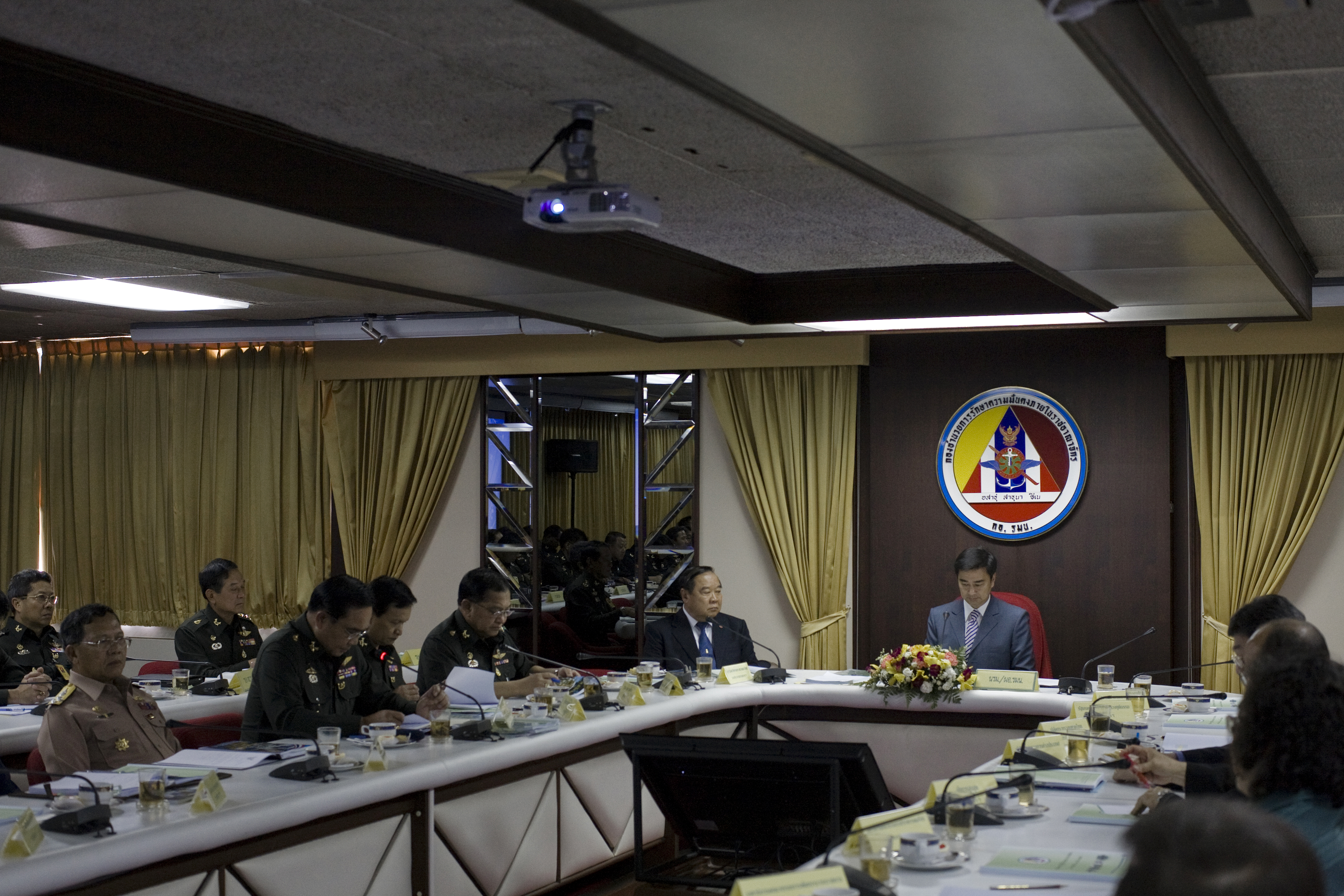 นายกรัฐมนตรี เป็นประธานการประชุมและกล่าวมอบนโยบายในการแถลงผลการปฏิบัติงานรอบ 6 เดือนของ กอ.รมน. ณ ห้องประชุม ชั้น 2 อาคาร ศปก.ทบ. (เดิม) ภายในสวนรื่นฤดี ถนนราชสีมา เขตดุสิต กรุงเทพฯ วันจันทร์ ที่ 2 พฤษภาคม พ.ศ.2554 (Photographer attached to the Prime Minister of the Kingdom of Thailand (H.E.Mr.Abhisit Vejjajiva) : Peerapat Wimolrungkarat / พีรพัฒน์ วิมลรังครัตน์) @is50mm